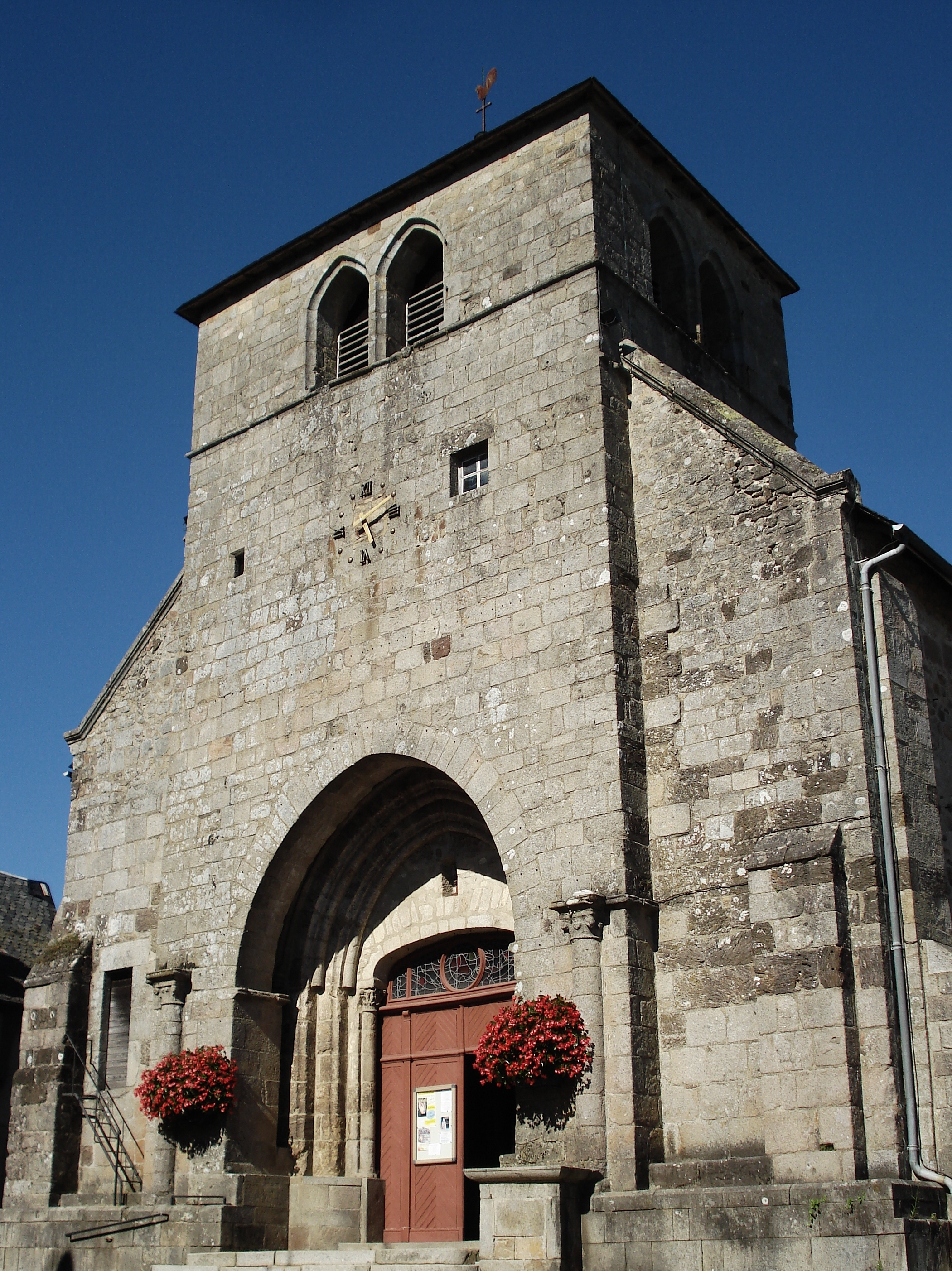 Neuvic en Corrèze : l'église